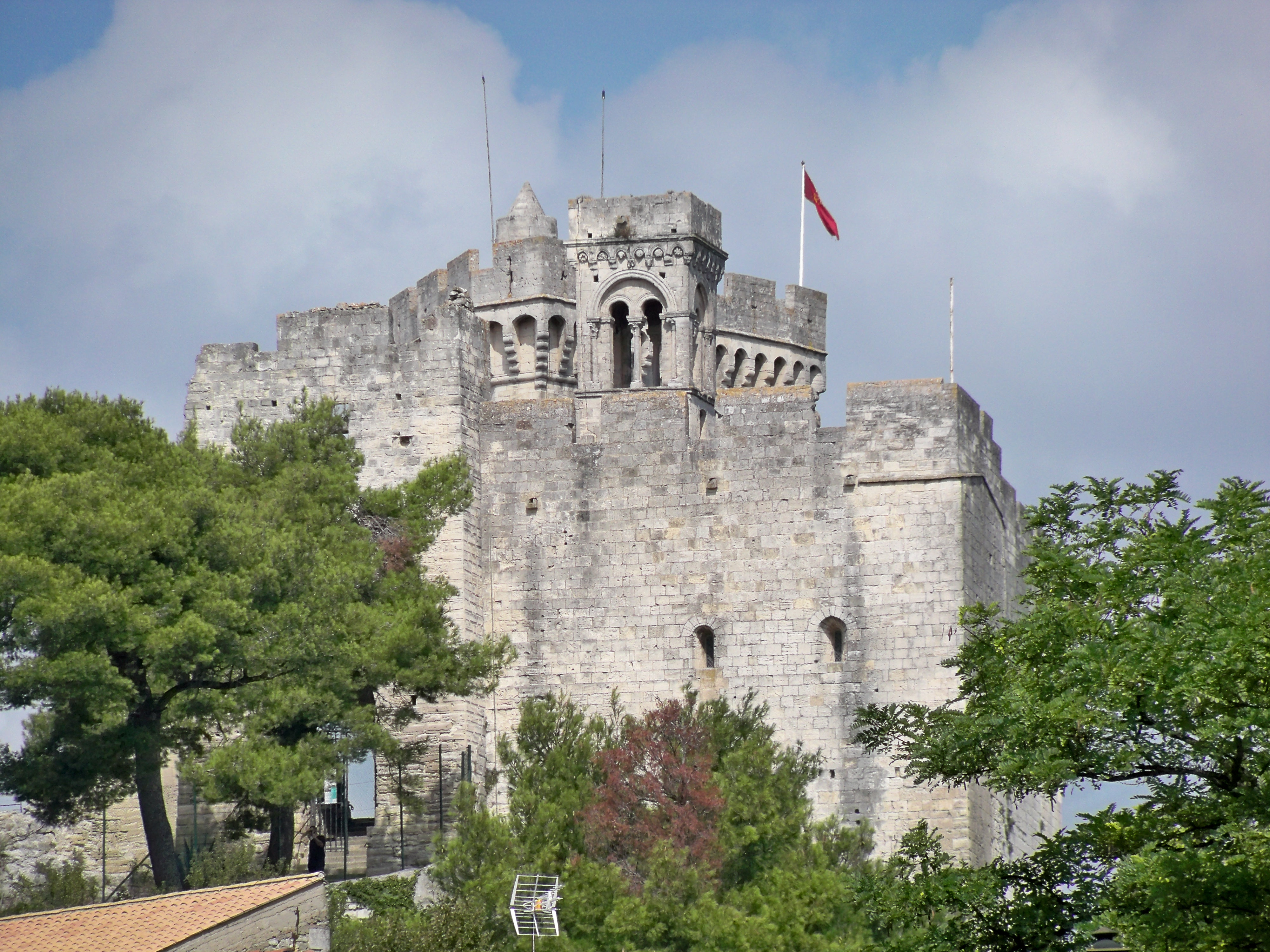 Château de Beaucaire (30)